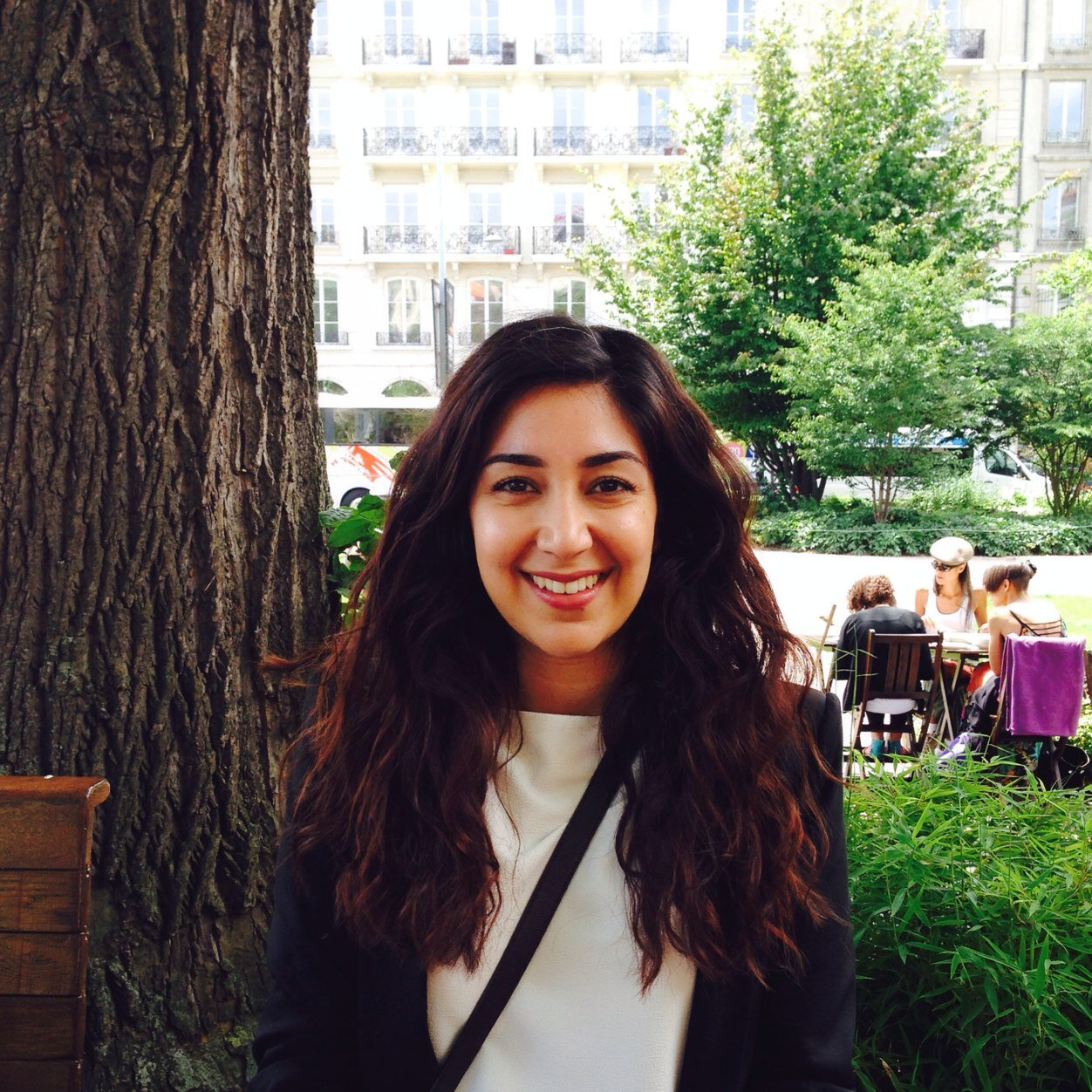 Lawen Redar